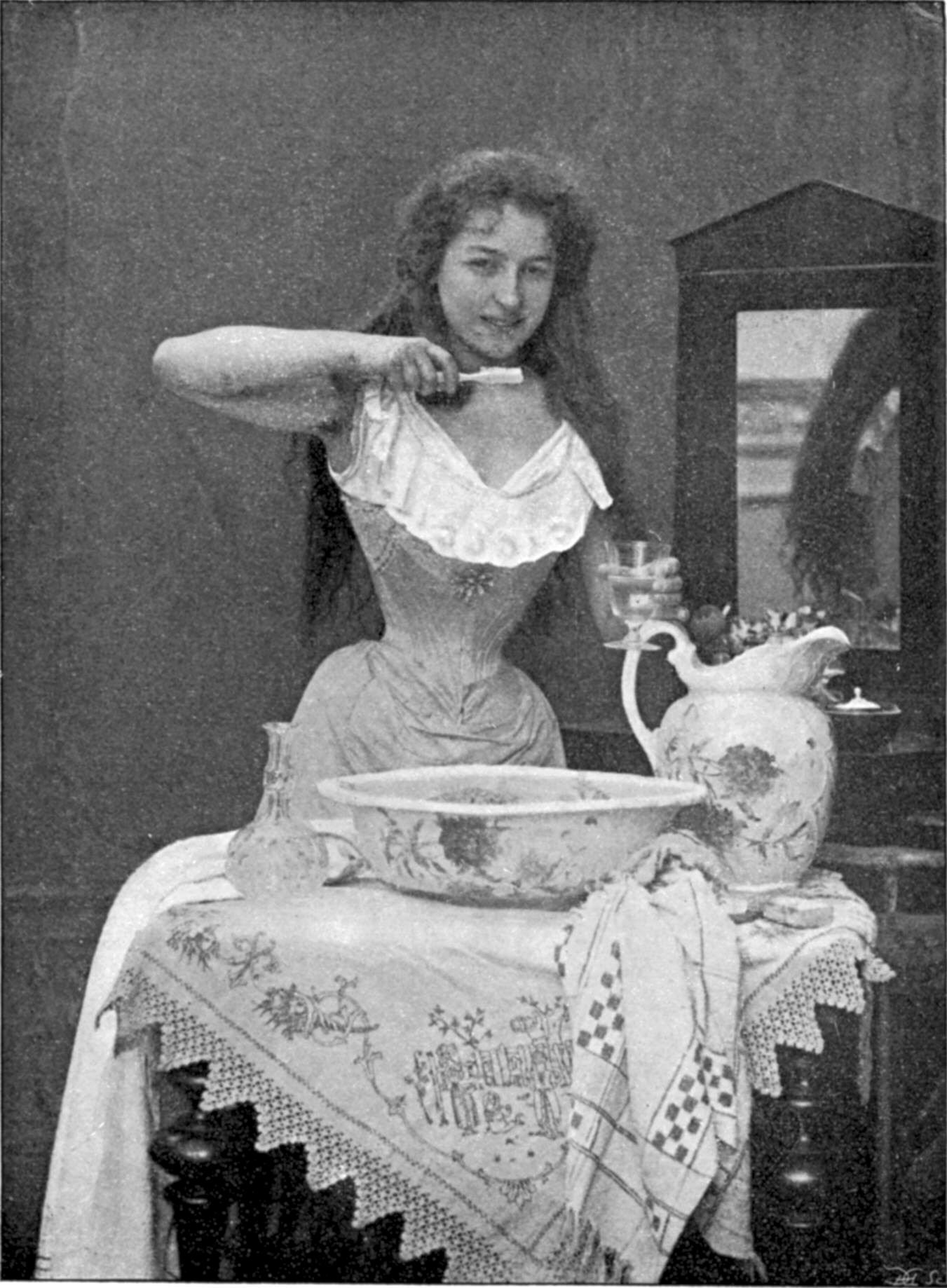 Die Pariserin bei ihrer Toilette; Die Toilette einer eleganten Pariserin ist ein sehr wichtiges Geschäft, das mit aller Sorgfalt und unter Widmung des gehörigen Zeitaufwandes besorgt werden will. An dem guten Willen fehlt es nie, denn die Toilette war seit jeher eine Lieblingsbeschäftigung der Pariserin und ist es bis zu dem heutigen Tag geblieben. Unsere Abbildungen lassen einige der wesentlichsten Phasen der Toilette verfolgen, von dem Augenblicke, wo die Pariserin zu ihrem Waschtisch tritt, um ihr Schönheitswerk zu beginnen, bis zu dem Schluss, den die Anlegung des Perlenhalsbandes bezeichnet. Man frage nicht, wie lange die Vollendung des Kunstwerkes gedauert, als welches die Toilette einer Pariserin sich darstellt.